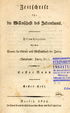 Die Publikation:"Die Wissenschaft des Judentums".